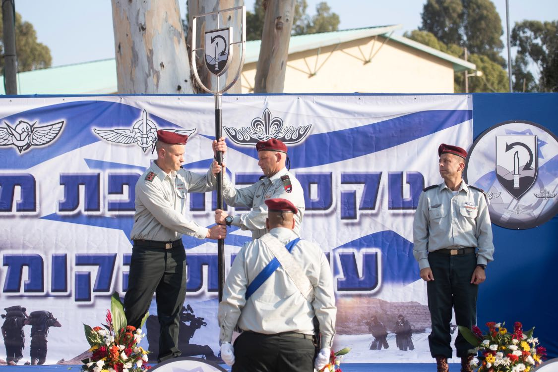 טקס חילופי מפקד לחטיבת "עז". אל"ם קובי הלר מחליף את תא"ל אבי בלוט שכיהן בתפקיד זה במהלך השנה שחלפה.